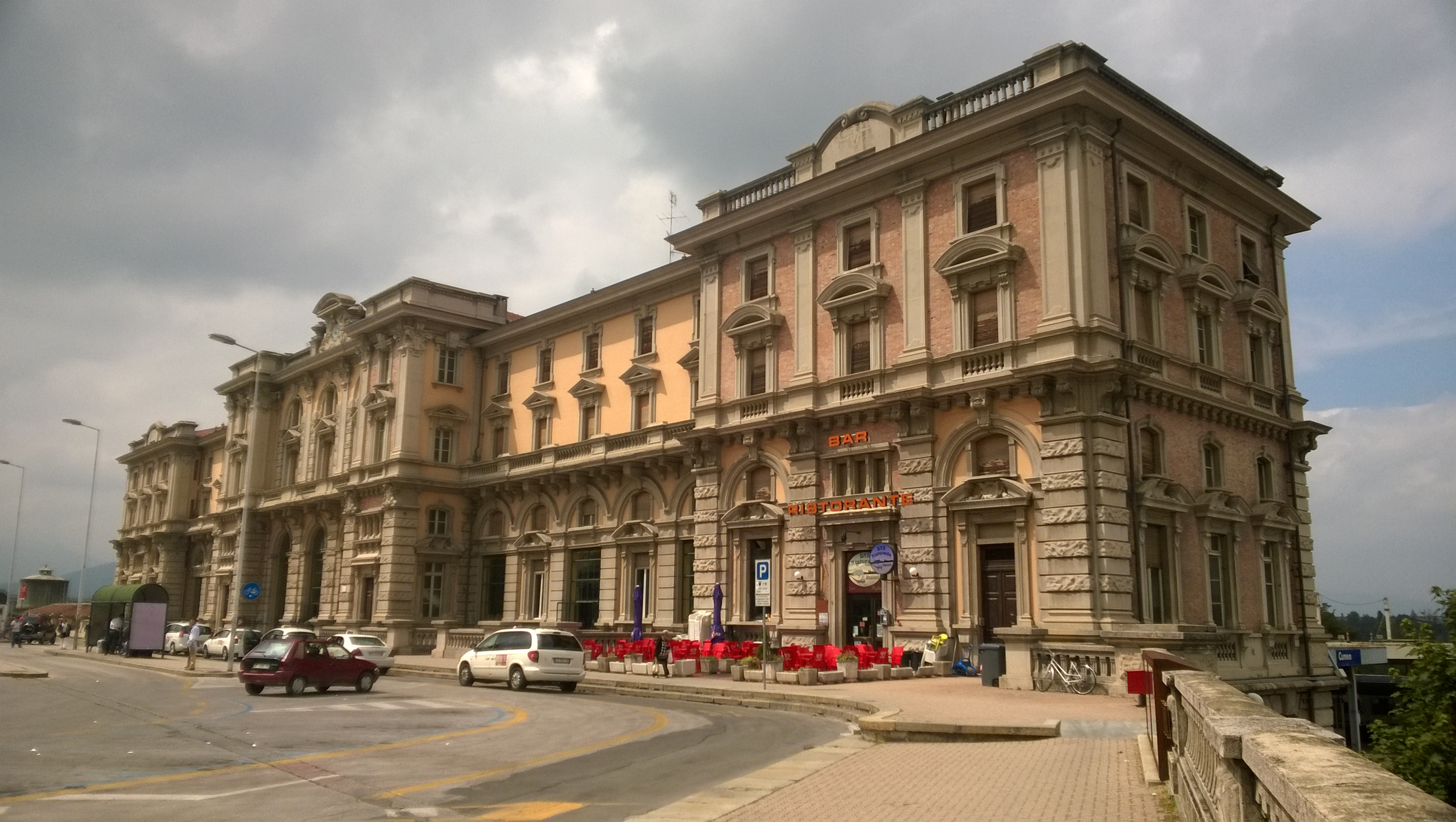 La stazione di Cuneo (CN), Italia.